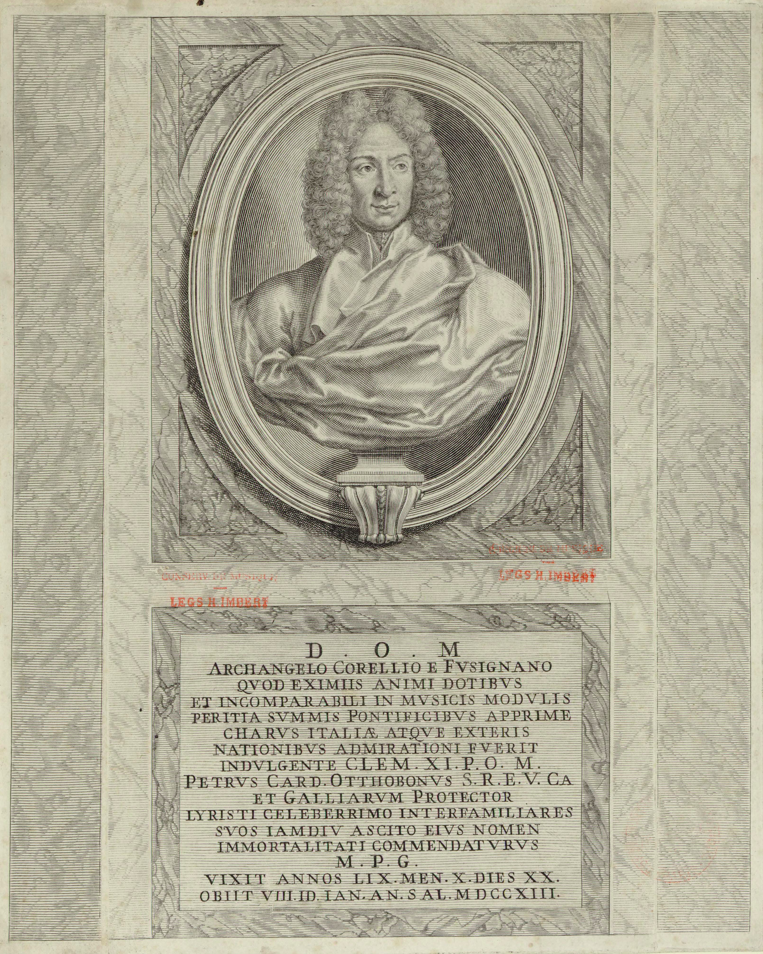 Il compositore Arcangelo Corelli. Incisione da un frontespizio del XVIII secolo dell'Op. VI.